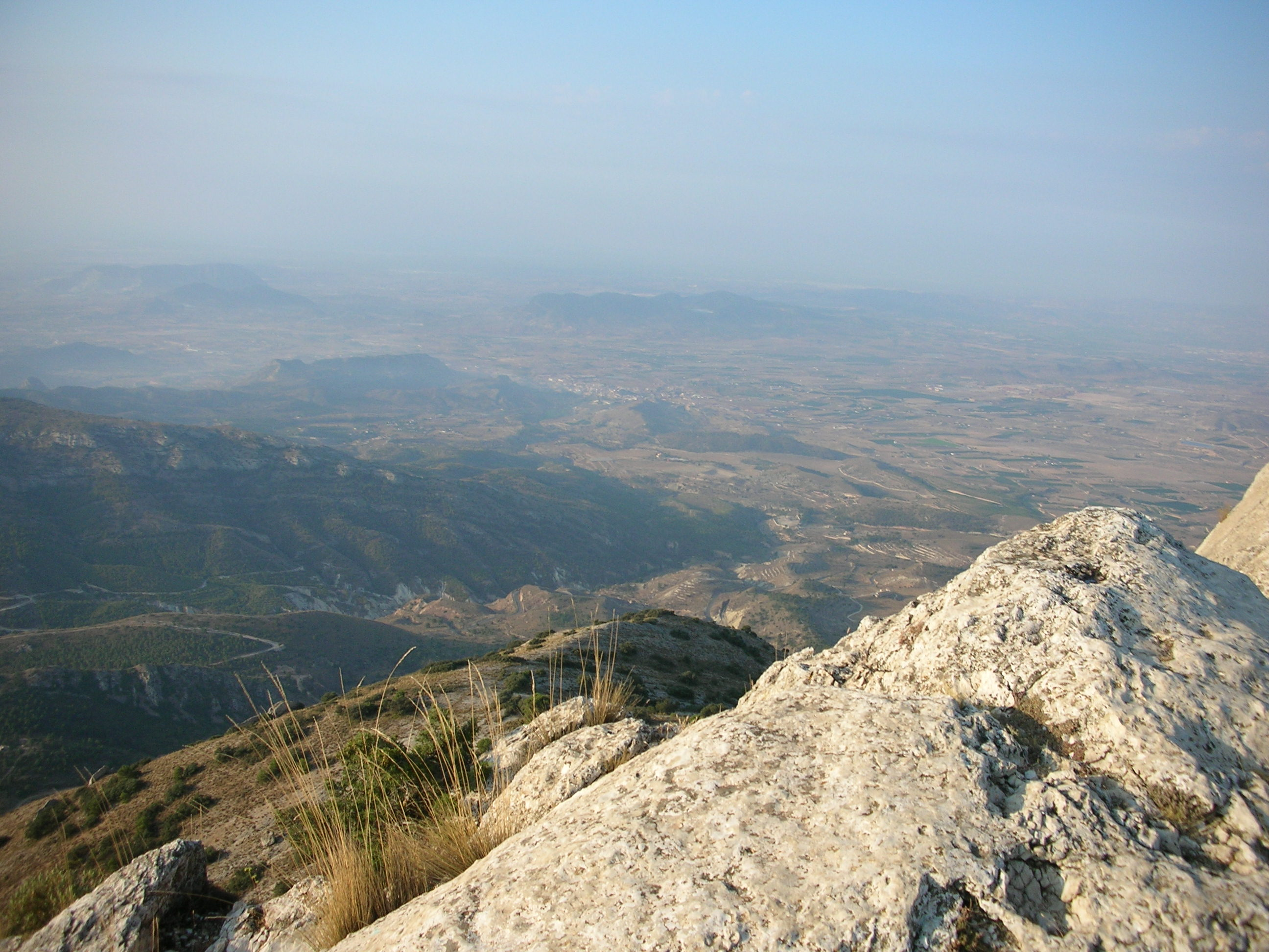 Vista cap al S des del Maigmó